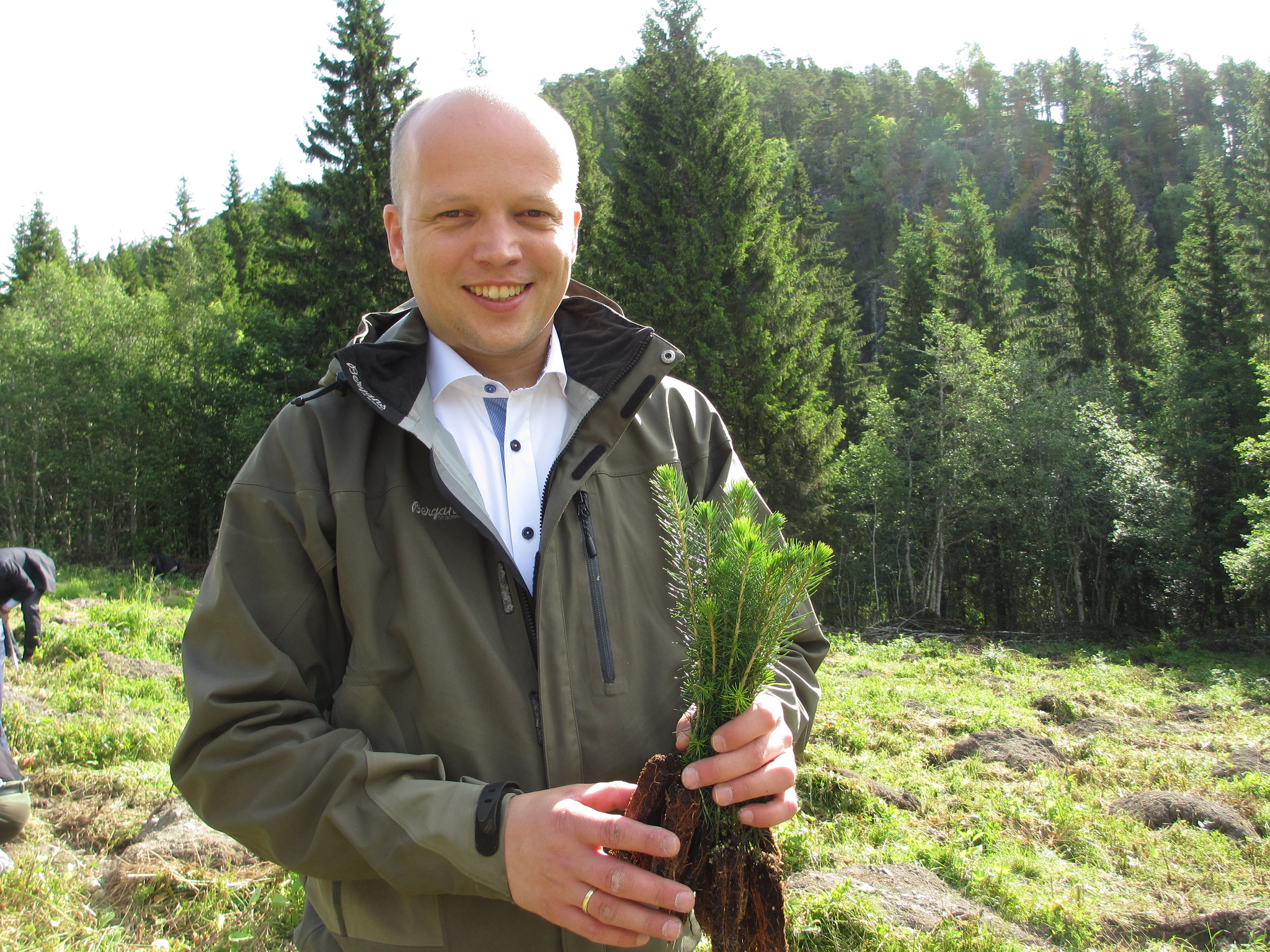 Landbruks- og matminister Trygve Slagsvold Vedum